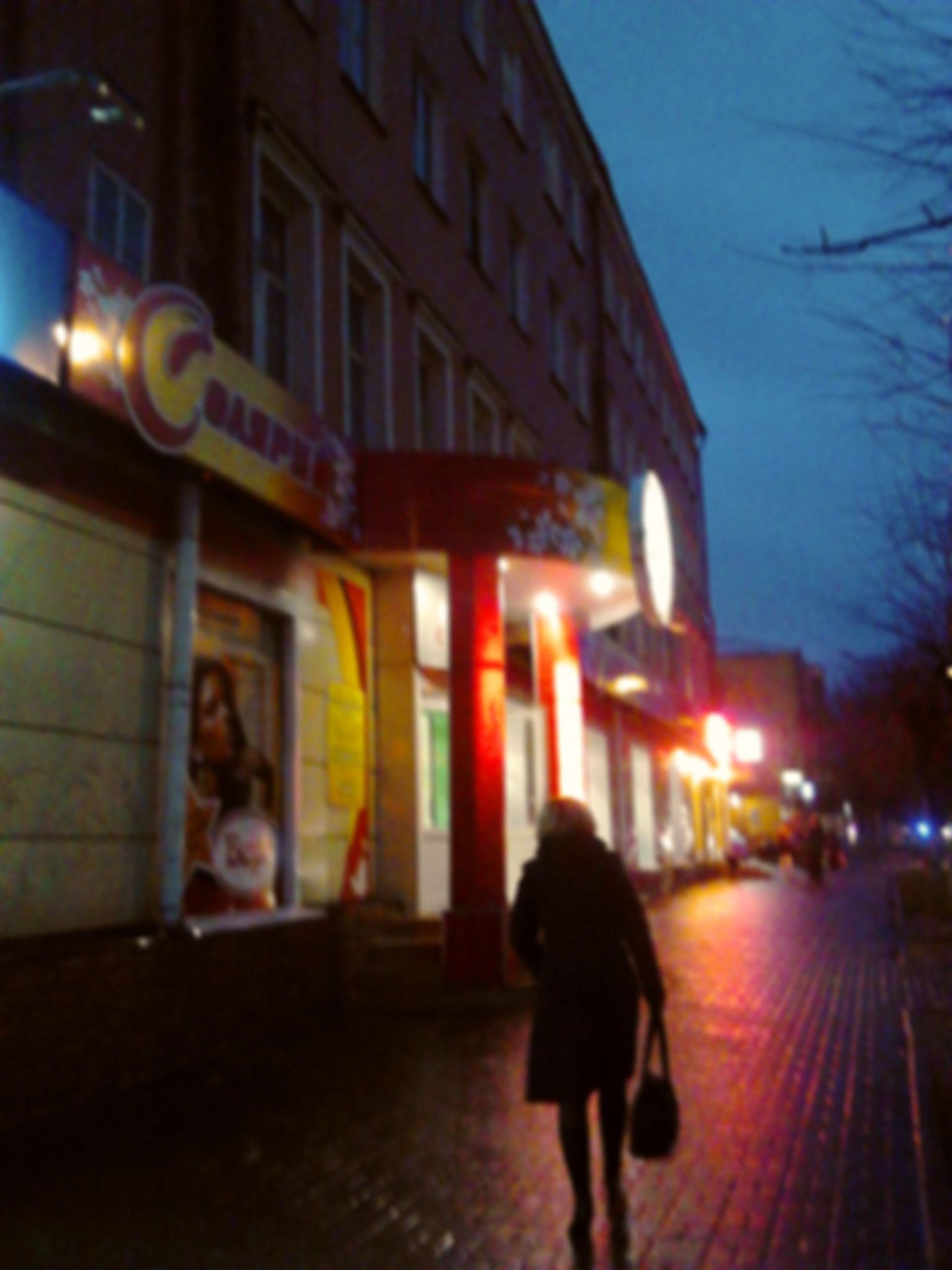 Осень 2012. На ул. Ленина